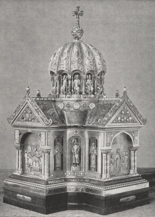 Corona-Leopardus-Schrein; heute Teil des Aachener Domschatz; Scan aus August Richard Maier: Der neue Corona- und Leopardusschrein. In: Aachener Kunstblätter, Heft 7/8, 1913